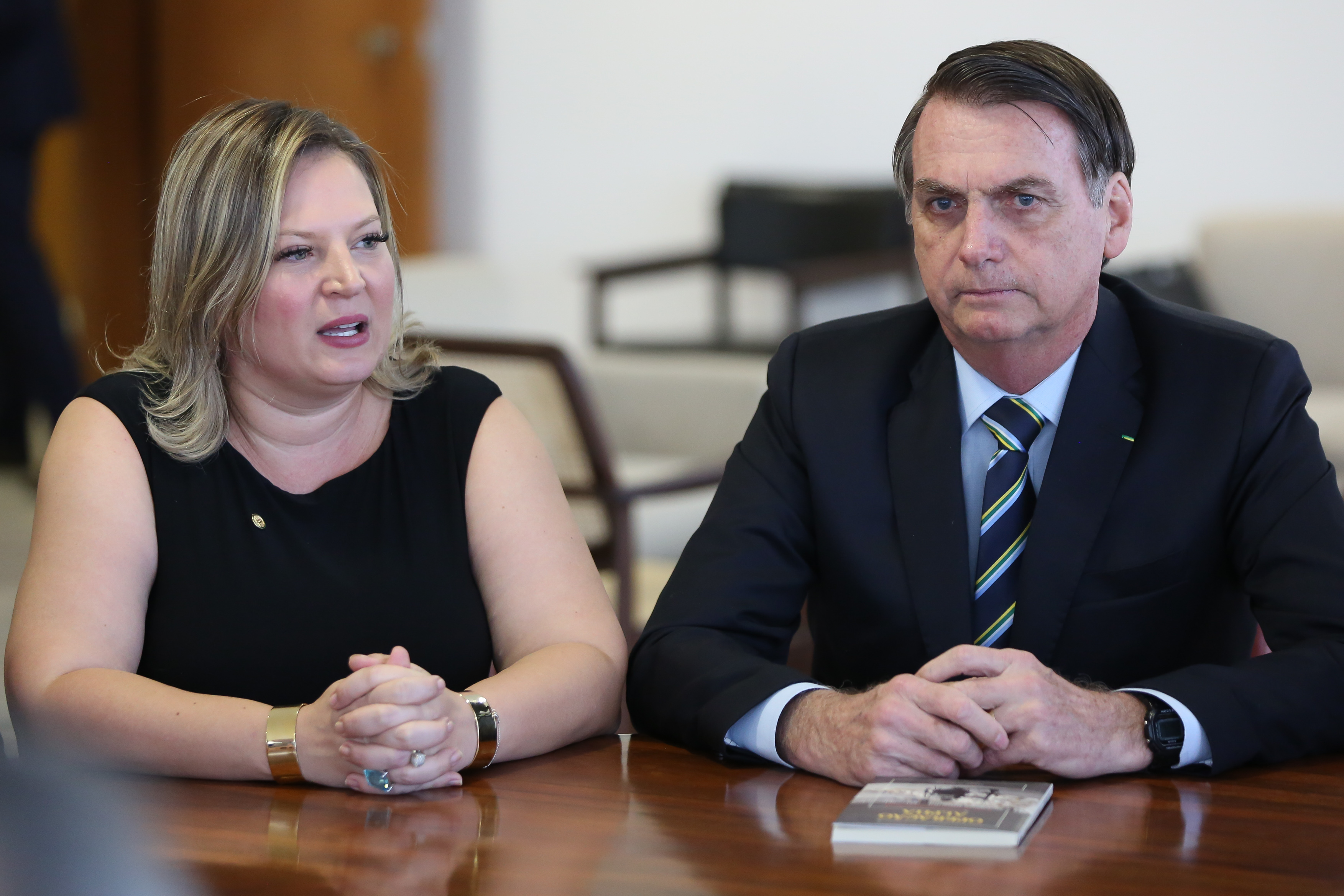 (Brasília - DF, 12/03/2019) Presidente da República, Jair Bolsonaro em reunião com Deputada Joice Hasselmann (PSL/SP) e Vice-líderes do governo no Congresso.